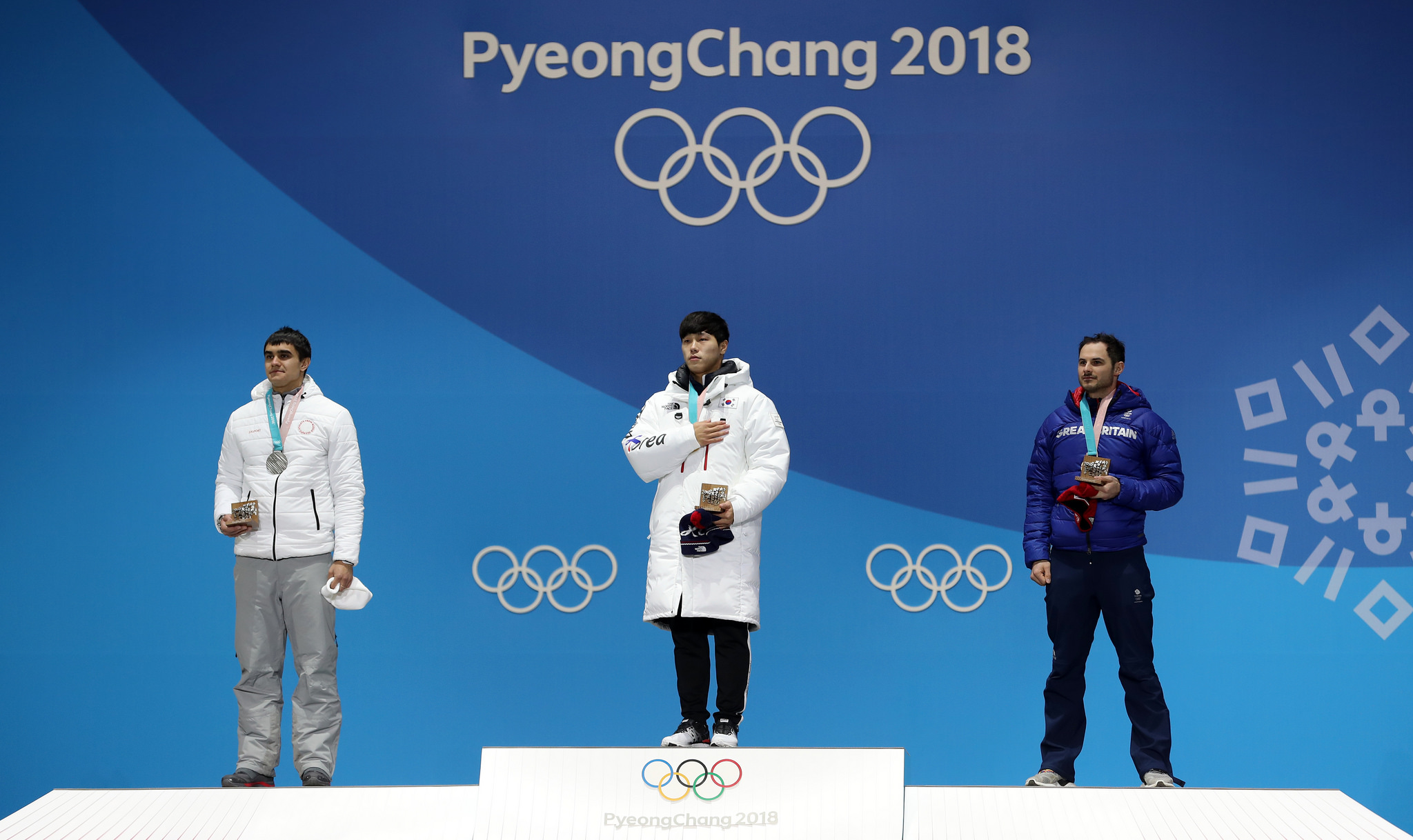 2018 PyeongChang Winter Olympic Games Men’s Skeleton Yun Sung-bin Medal Ceremony February 16, 2018 PyeongChang Medal Plaza, Pyeongchang-gun, Gangwon-do